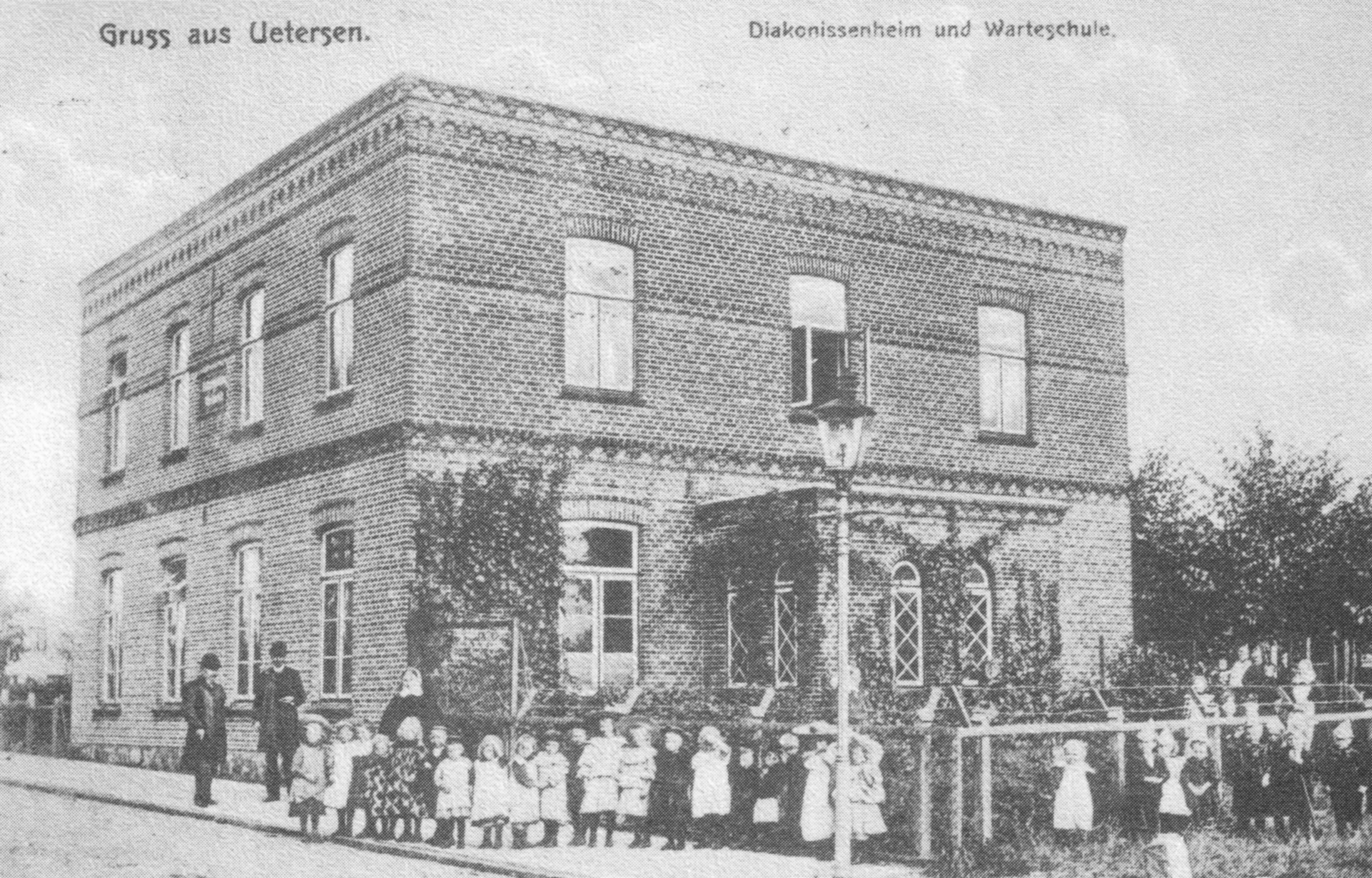 Postkarte aus Uetersen aus dem Jahr 1910, das Diakonissenheim und kirchliche Warteschule in der Katharinenstraße.